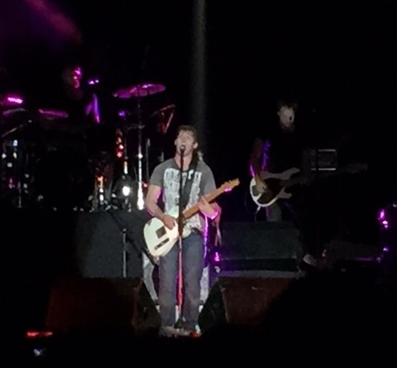 James Blunt en Asunción, Paraguay